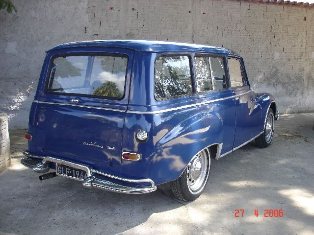 Camioneta DKW-Vemag Vemaguet ano de fabricação 1964, onde as portas começaram a abrir normalmente. Até 1963 as portas se abriam ao contrário conquistando o apelido de portas "suicida" ou "DêChaVê"